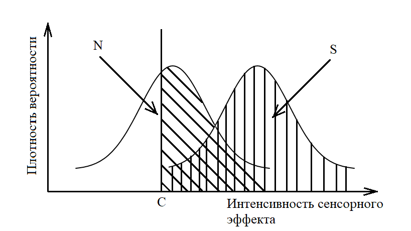 Метод ТОС. Модель обнаружения сигнала для либерального критерия